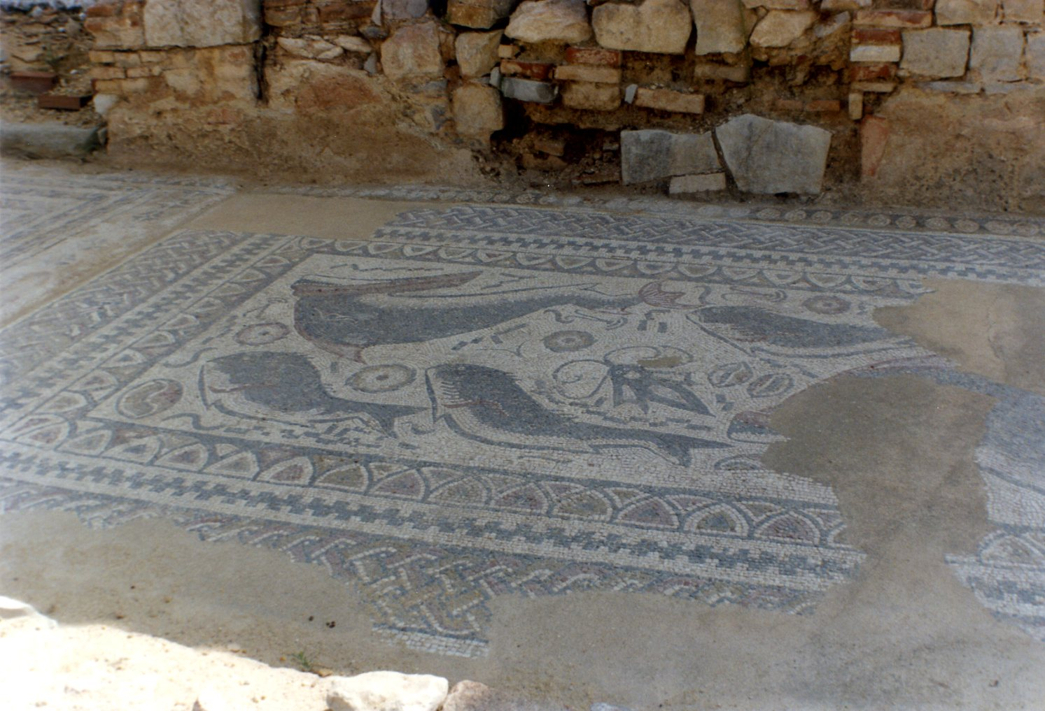 Ruínas romanas de Milreu This file was uploaded for Wiki Loves Monuments in Portugal with the unique identifier 70255.